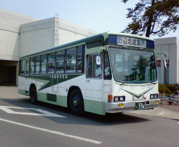 十和田観光電鉄バス 一般路線塗色：国際興業グループカラー（いすゞ・キュービック：U-LV324K） （八戸ナンバーであるため、三本木営業所所属車である。） 十和田市駅付近にて